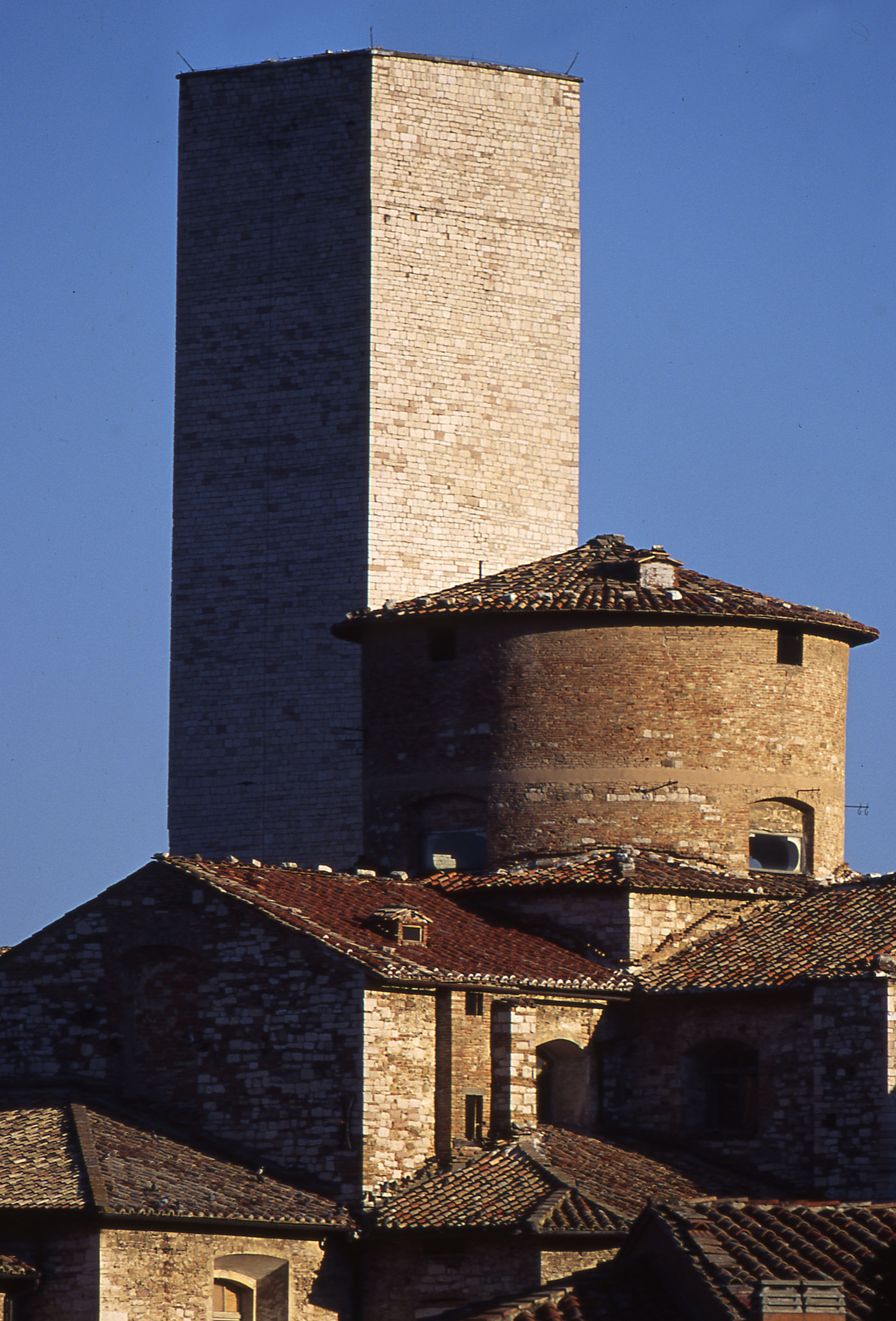 Porta Trasimena o di San Luca This is a photo of a monument which is part of cultural heritage of Italy.